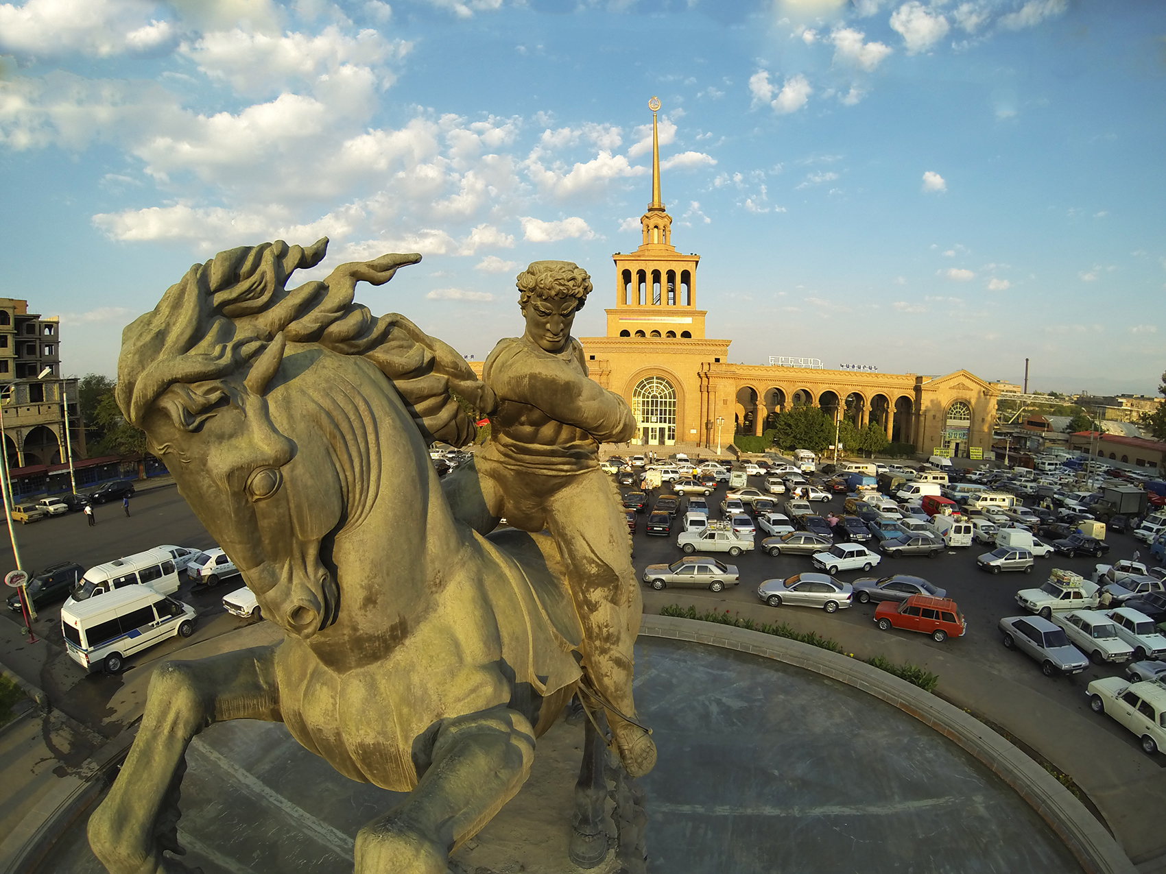 Սասունցի Դավիթ 360yerevan 5/16